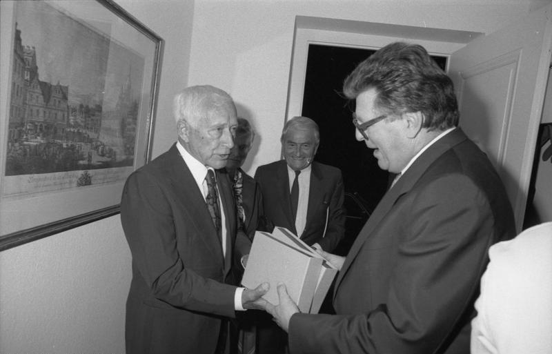 15.9.1986 Der Präsident des Deutschen Bundestages, Dr. Philipp Jenninger, empfängt den Schriftsteller Ernst Jünger in seiner Dienstvilla in Bad Godesberg.